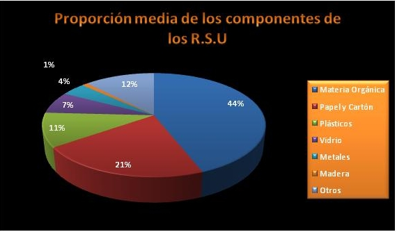 Roscón gráfico sobre la producción de los diversos componentes de los residuos urbanos españoles.